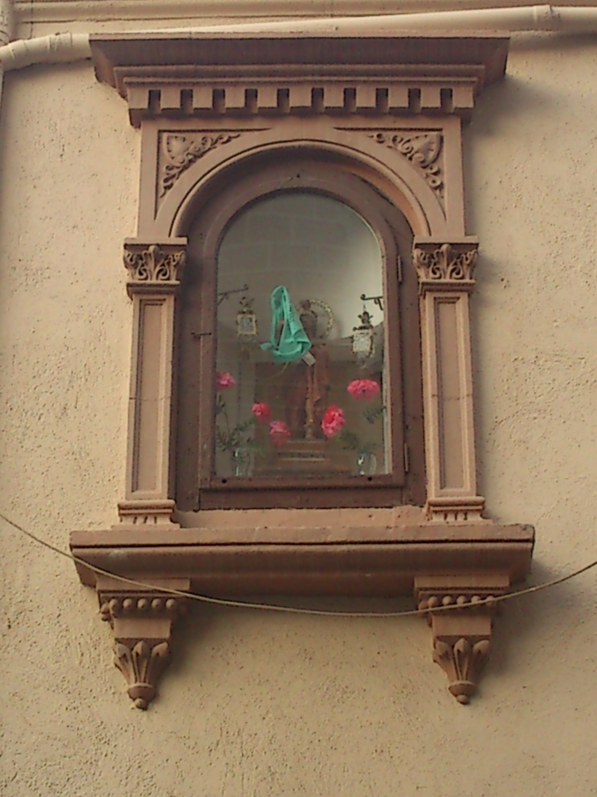 Altar a Sant Anastasi de Lleida (o de Badalona), al carrer de Sant Anastasi, Badalona